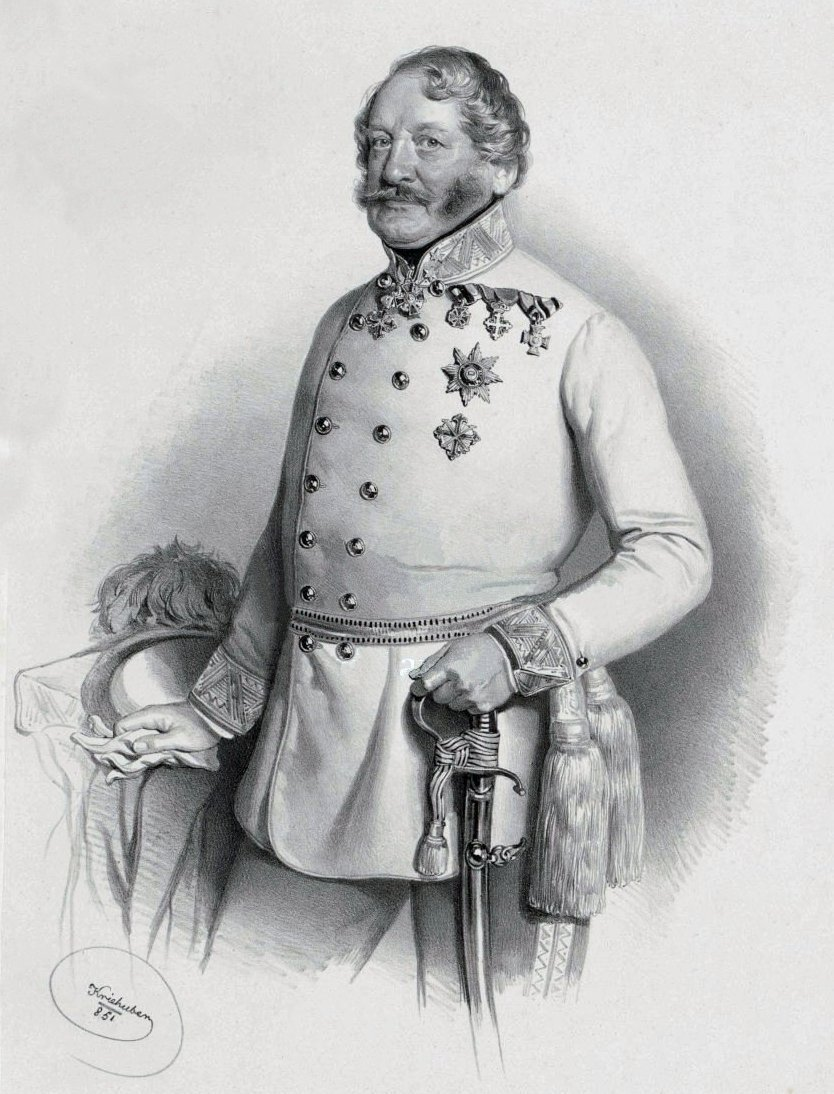 Franz Freiherr (1850) Dahlen von Orlaburg 1840 als FML